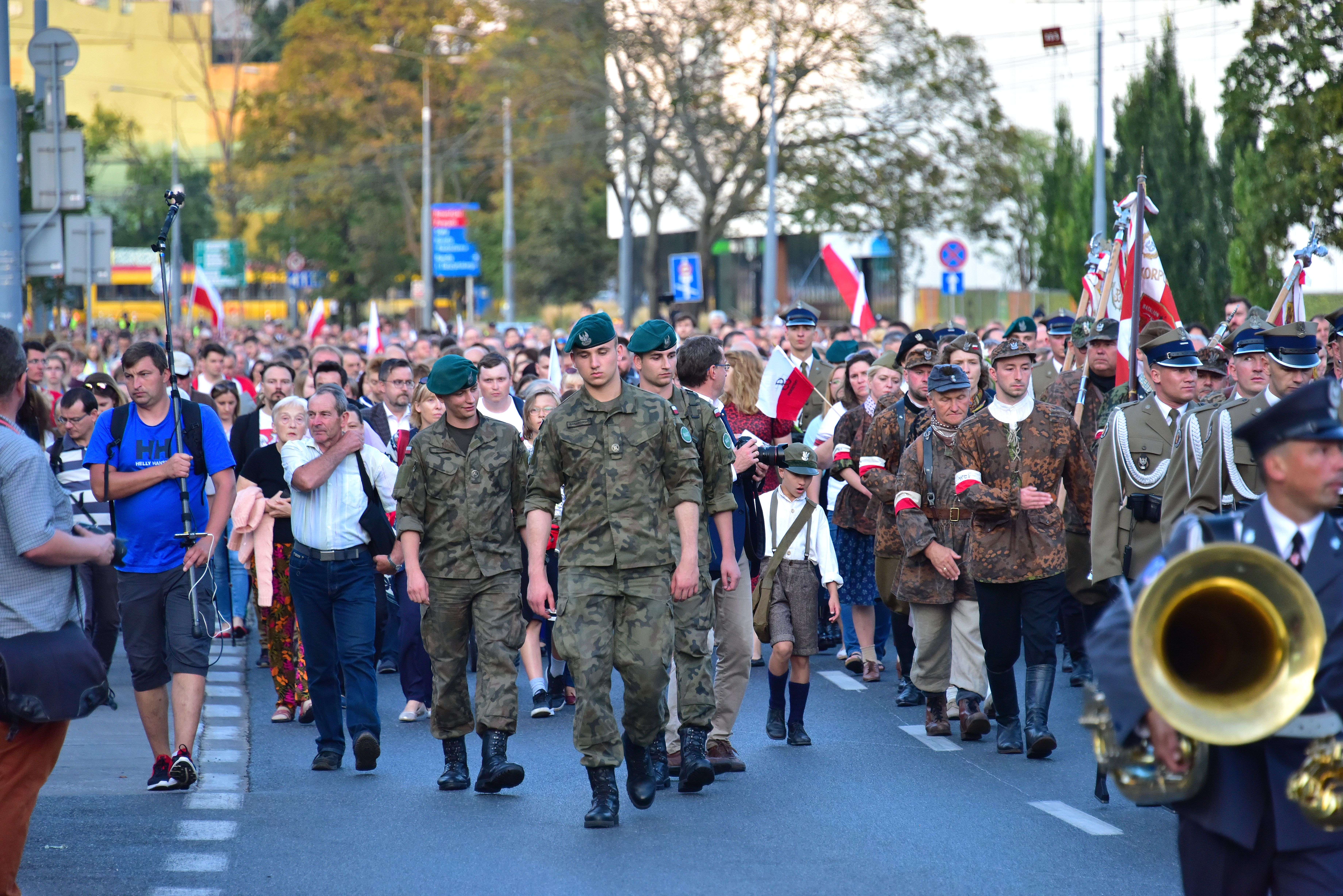 Marsz Pamięci Ofiar Cywilnych Powstania Warszawskiego. Aleja "Solidarności" w Warszawie na odcinku między ulicami Karolkową i Młynarską